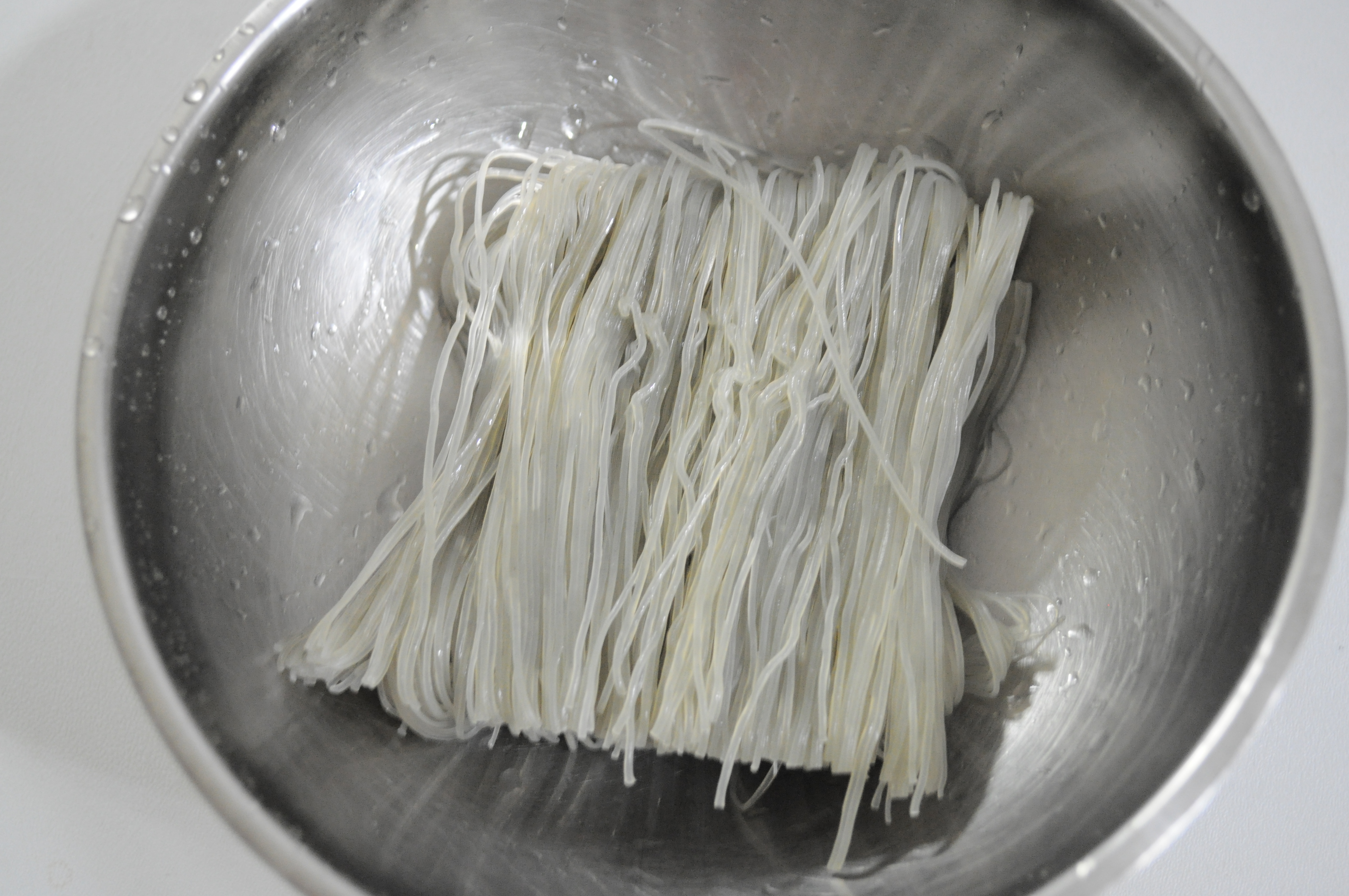 냉면 면